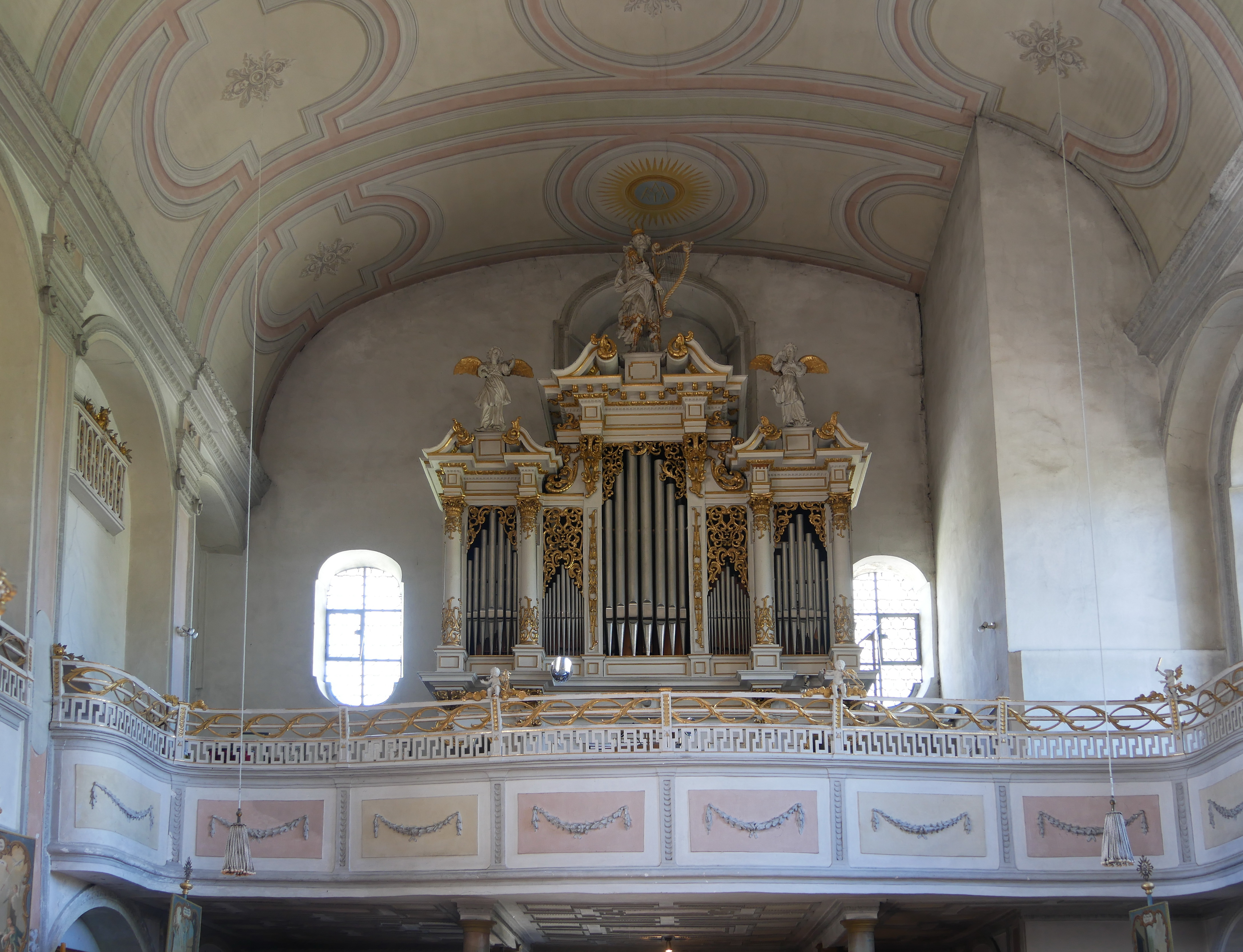 Bernried, Klosterhof 10, Kath. Pfarrkirche St. Martin. Detail Innenansicht: Empore und Orgel